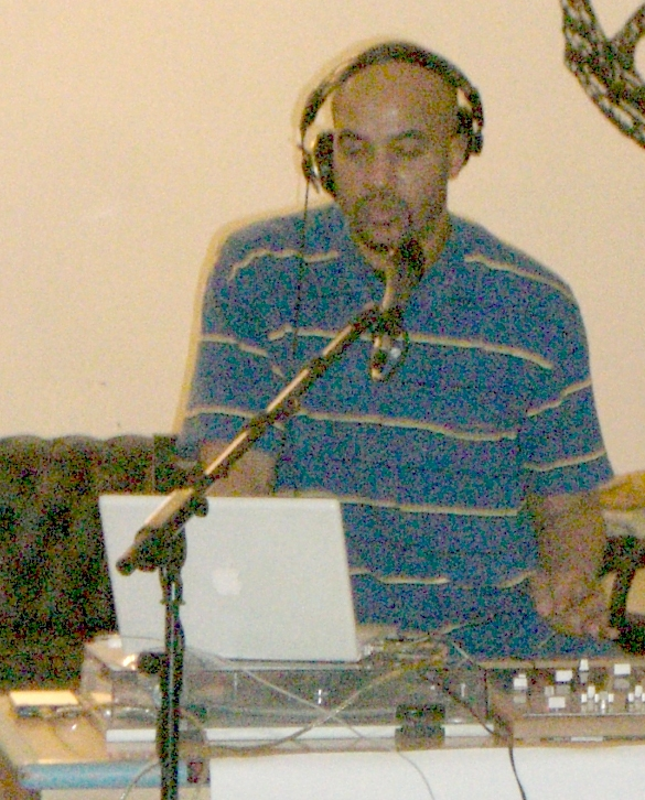 JotaMayúscula el 02/02/2008 en el Centre d'Art Santa Mònica de Barcelona.